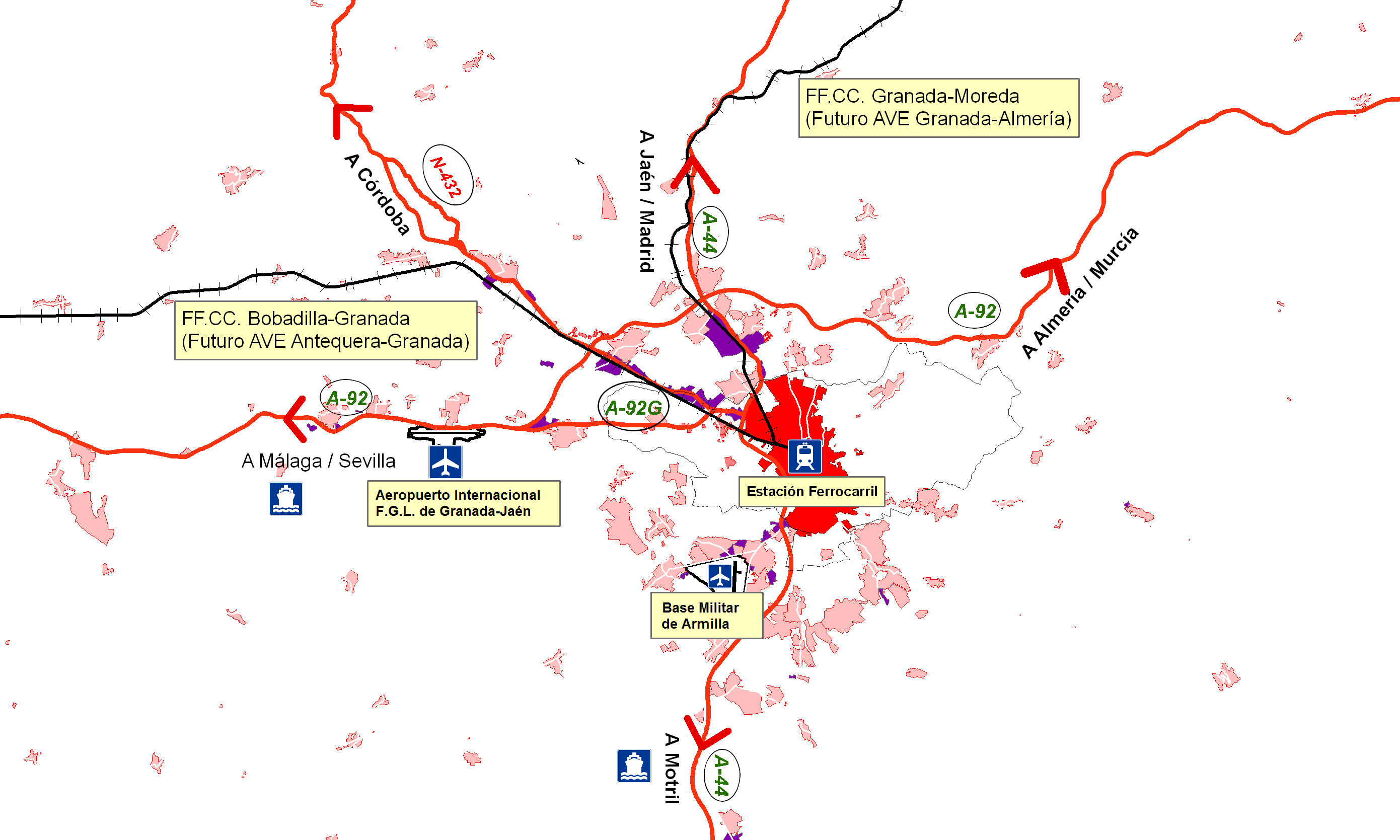 Infraestructura de transportes en Granada.